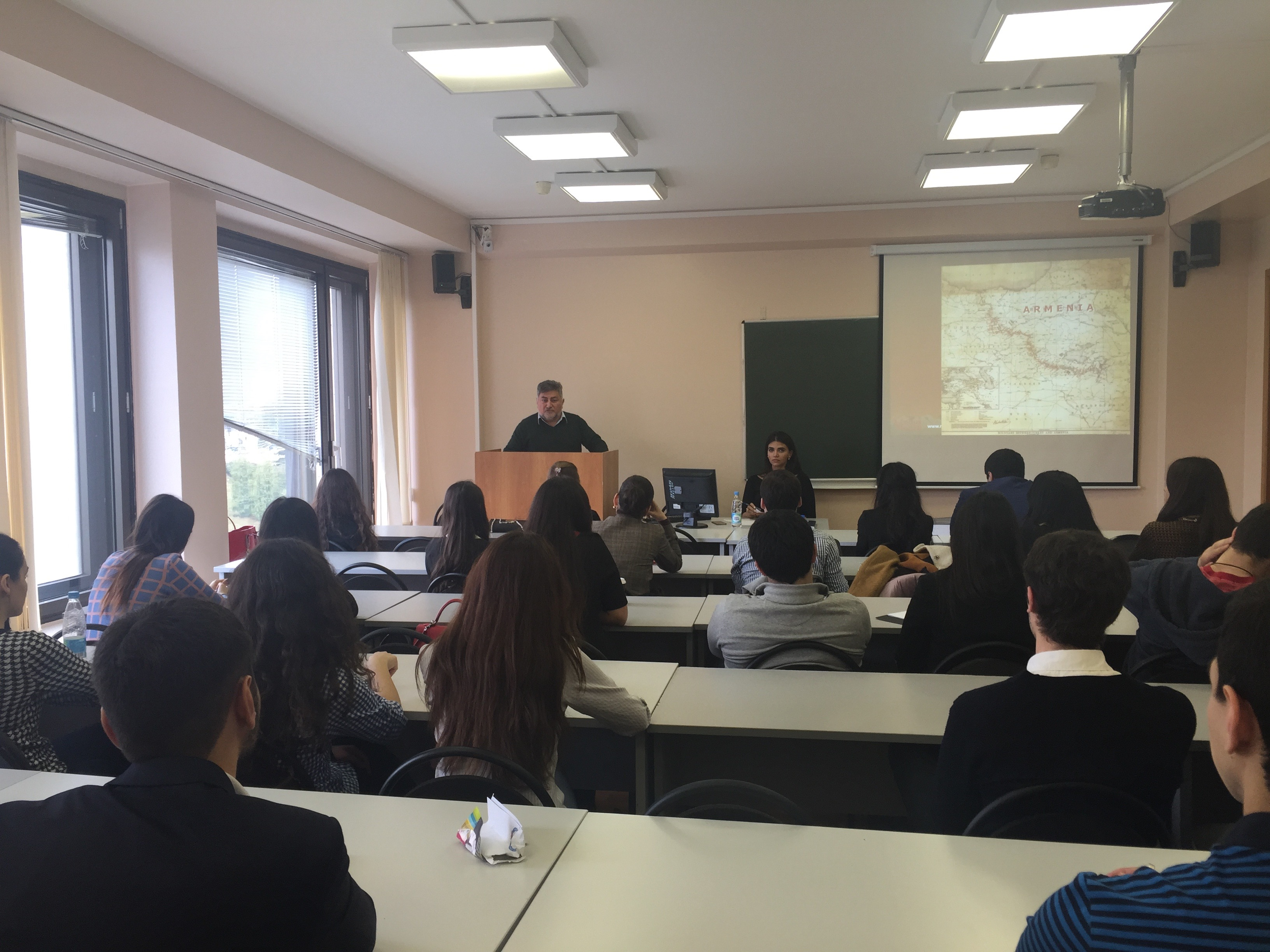 Արա Պապյանը Միջազգային հարաբերությունների Մոսկվայի պետական համալսարանում (ՄՀՄՊԻ) 2015 թվականի ապրիլի 16-ին:Aragonés: Lection of Ara Papian in Moscow State Institute of International Relations organized by Armenian Youth Congress of Russia (AYCR). 2015 April 16.